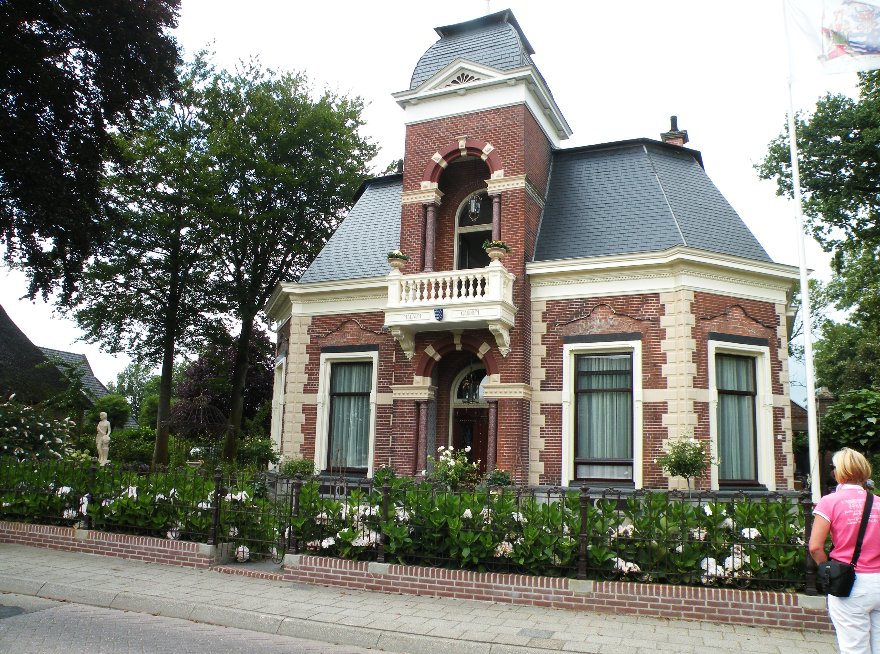 Huis aan Dijkhuizen_Ruinerwold (Dijkhuizen 13). Rijksmonument nr. 507383